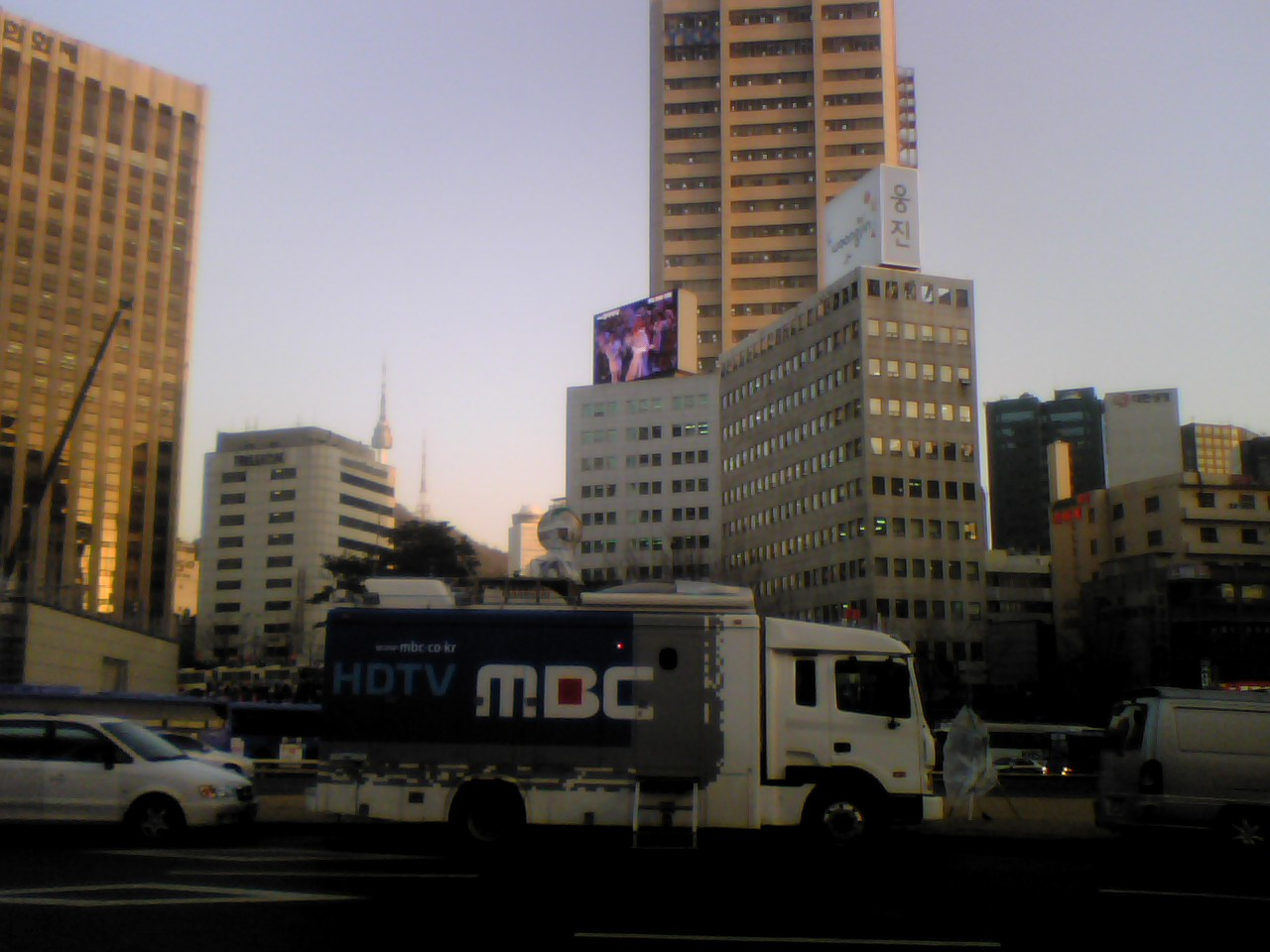 2008년에 제가 직접 찍어서 네이버 카페에 올린 사진입니다.